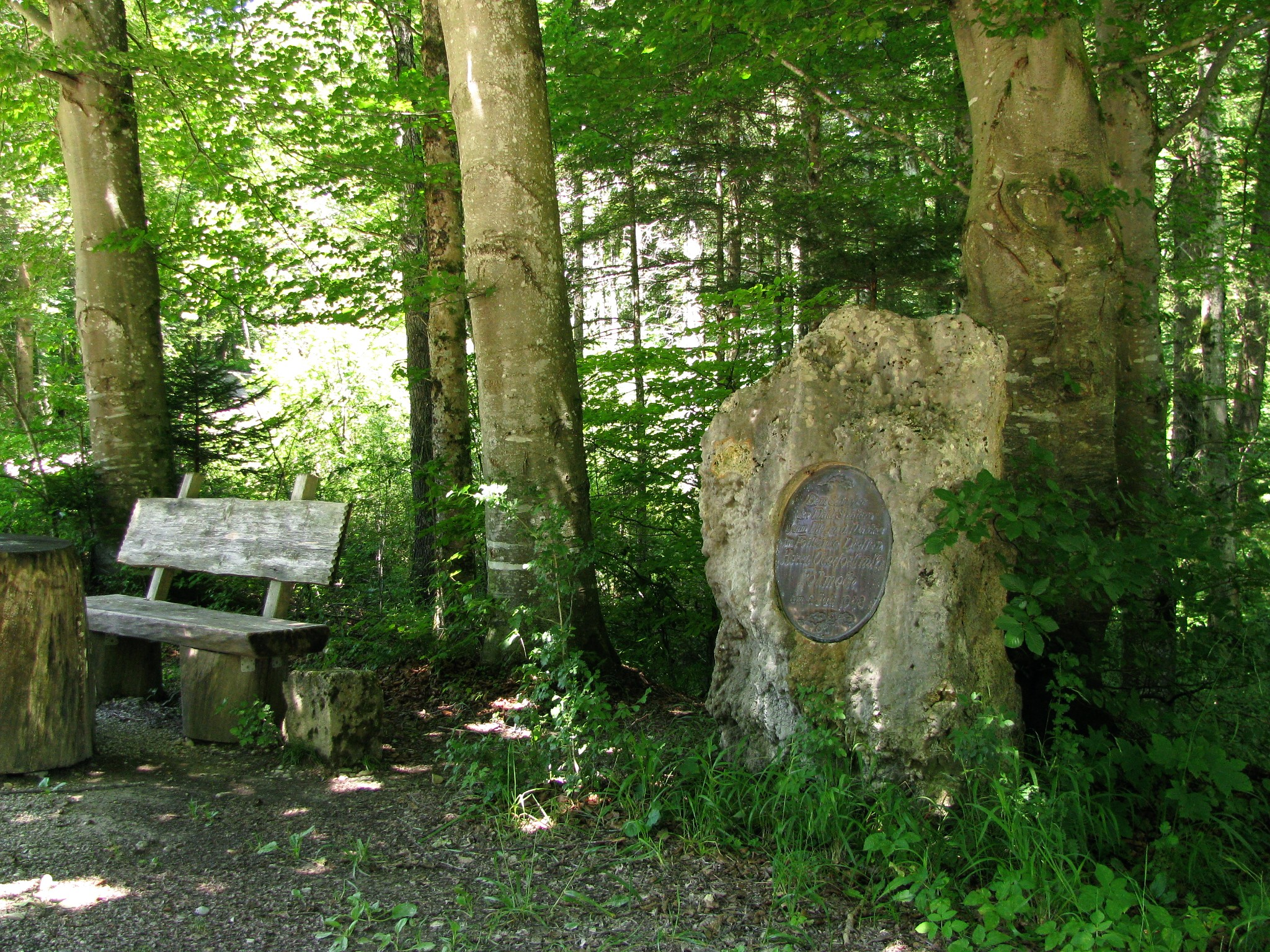 Denkmal im Staatsforst Bayerdießen; Inschrift: „Dem Schöpfer der Wald-Straßen dem Pfleger d. Waldes im Forstamte Dießen Herrn Oberforstmstr. Fellmeth am 6. Juli 1948“